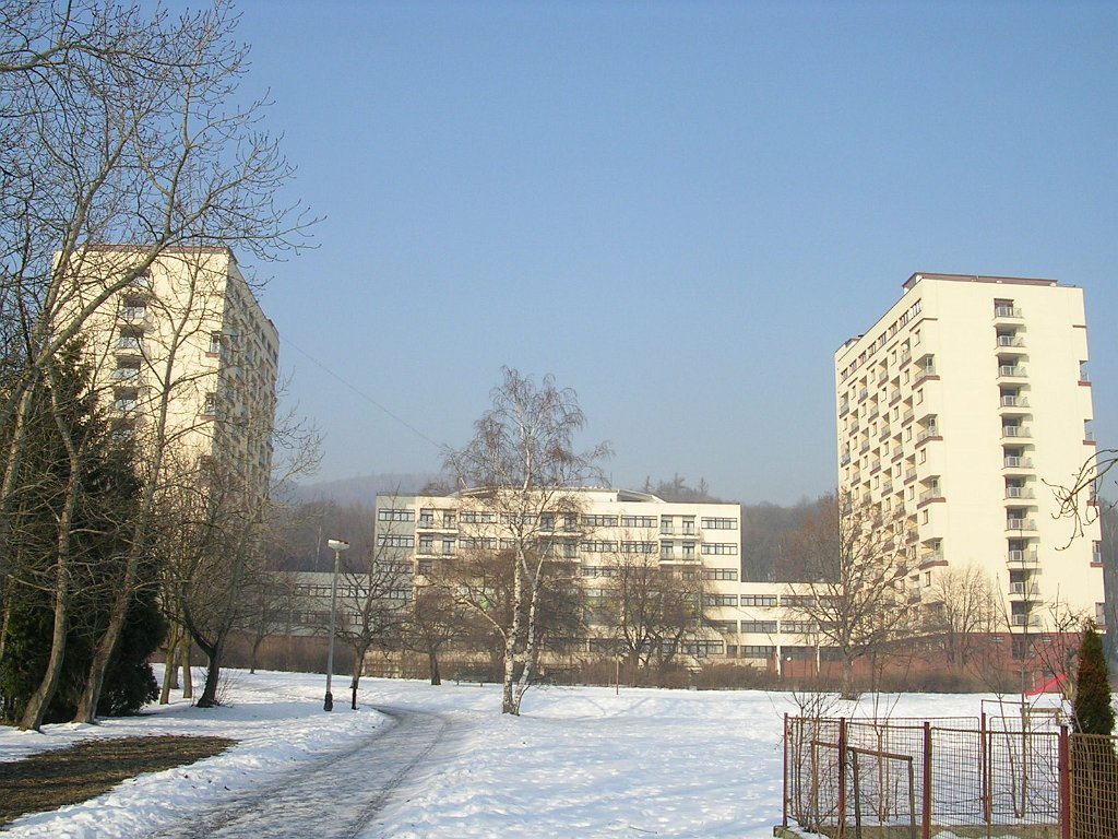 Kolektivní dům v Litvínově, pohled od sportovní haly